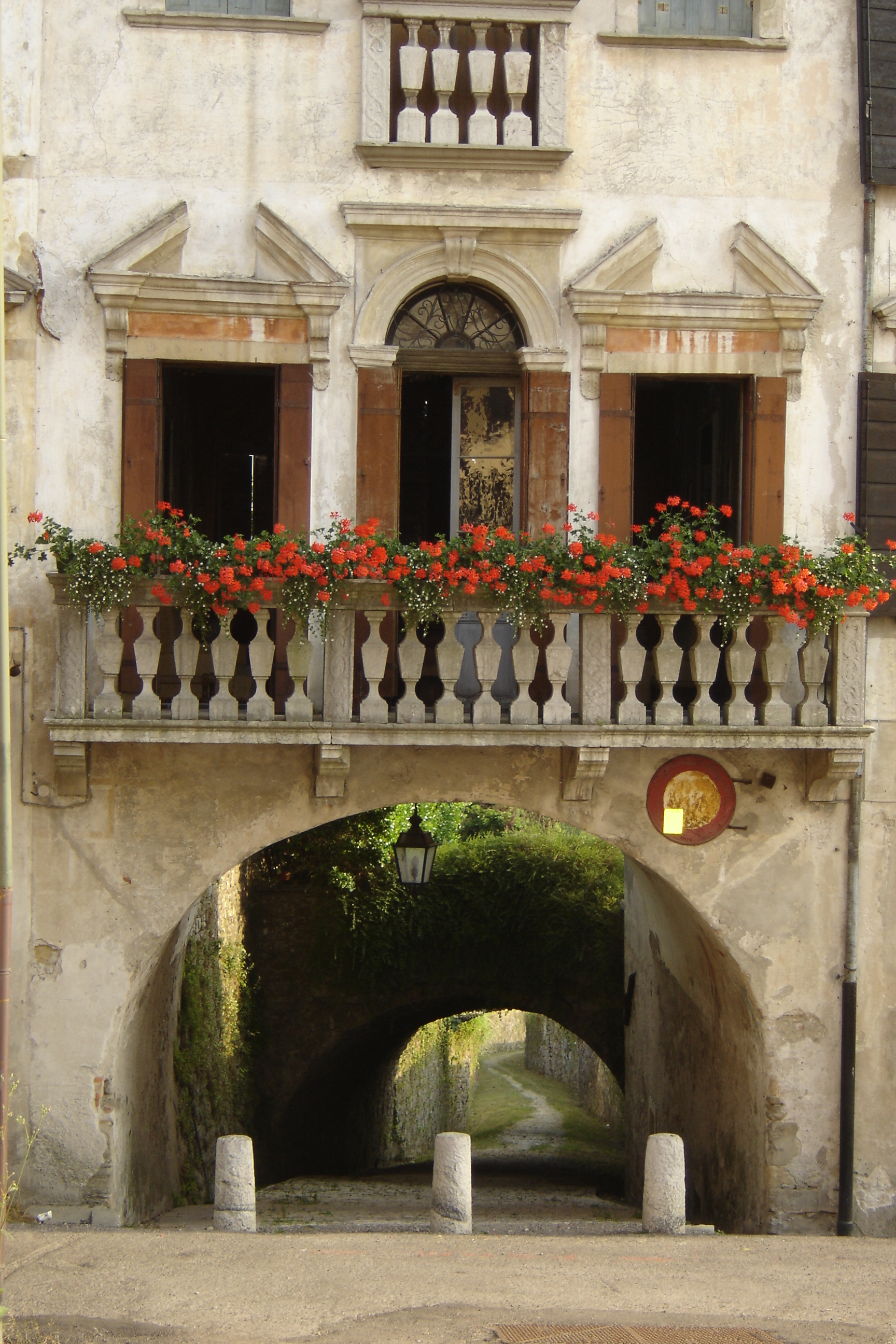 foto scattata da Jacobus